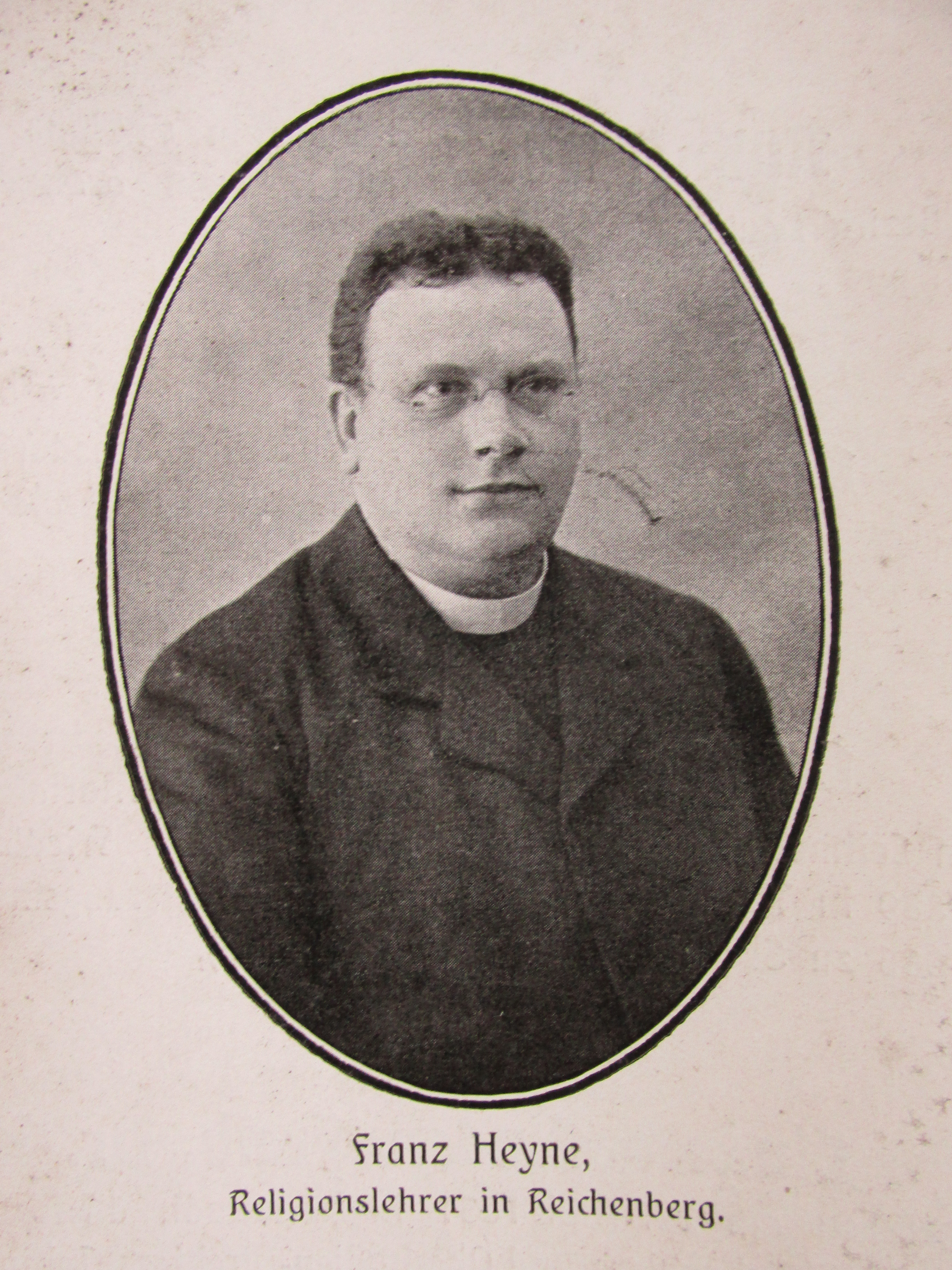 P. Franz Emil Heyne; * 14. 09. 1863 Rumbrk - Nová Starost, čp. 20; syn: Ignatz Heyne - pekařský mistr, syn Josefa Heyne a Theresie roz. Pietschwarnn; Theresie, dcera Franze Grosmanna a Theresie roz. Petters; gymnaziální studia na Gymnáziu v Chomutově; ord. na kněze 1888; kaplan v Jablonci nad Nisou vojenský kaplan II. třídy; katecheta chlapecké školy v Liberci